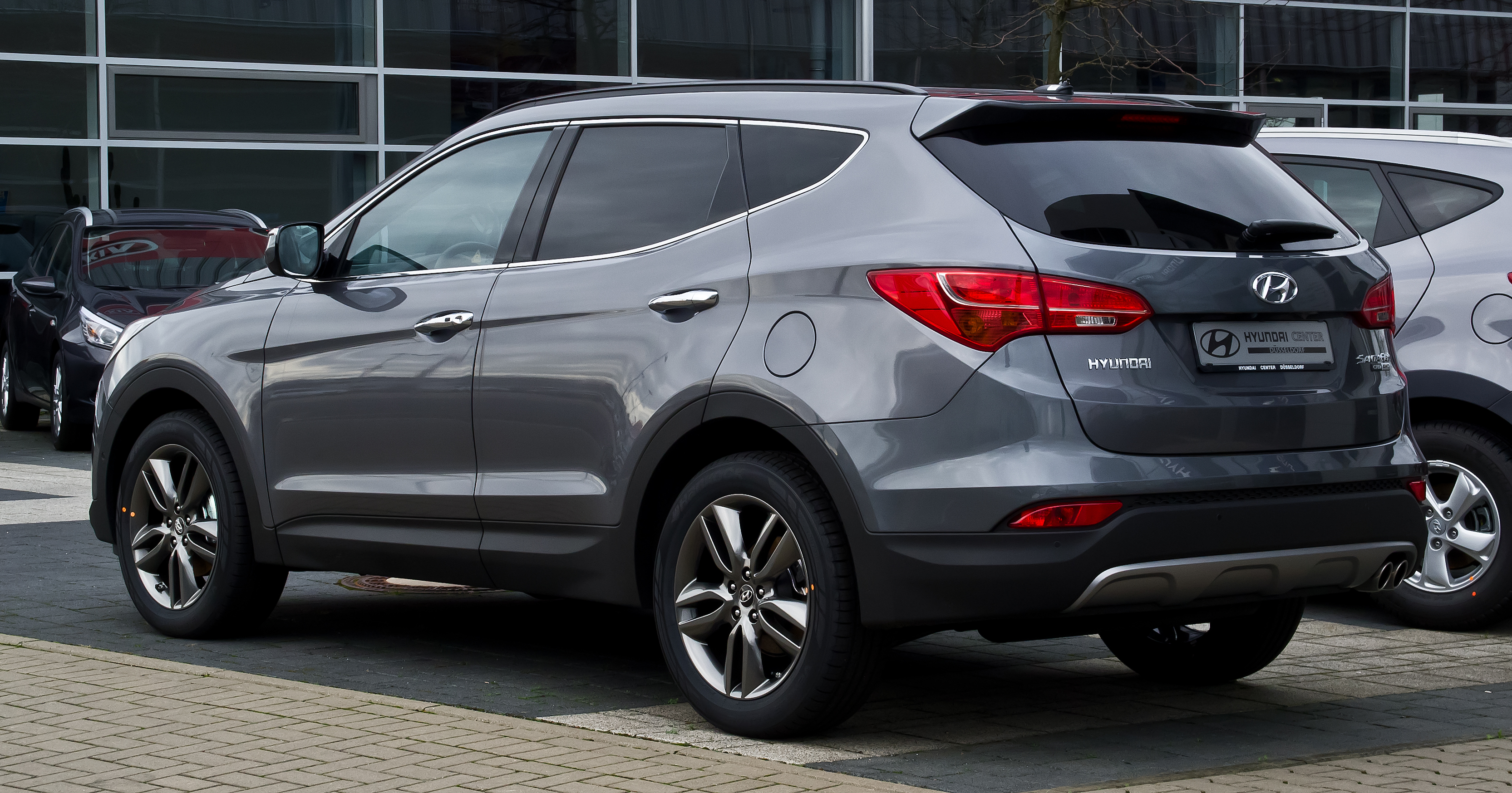 Hyundai Santa Fe 2.2 CRDi 4WD Premium (III)